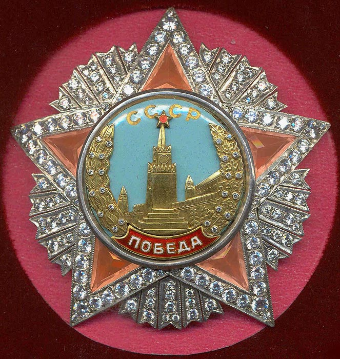 Копия ордена «Победа»